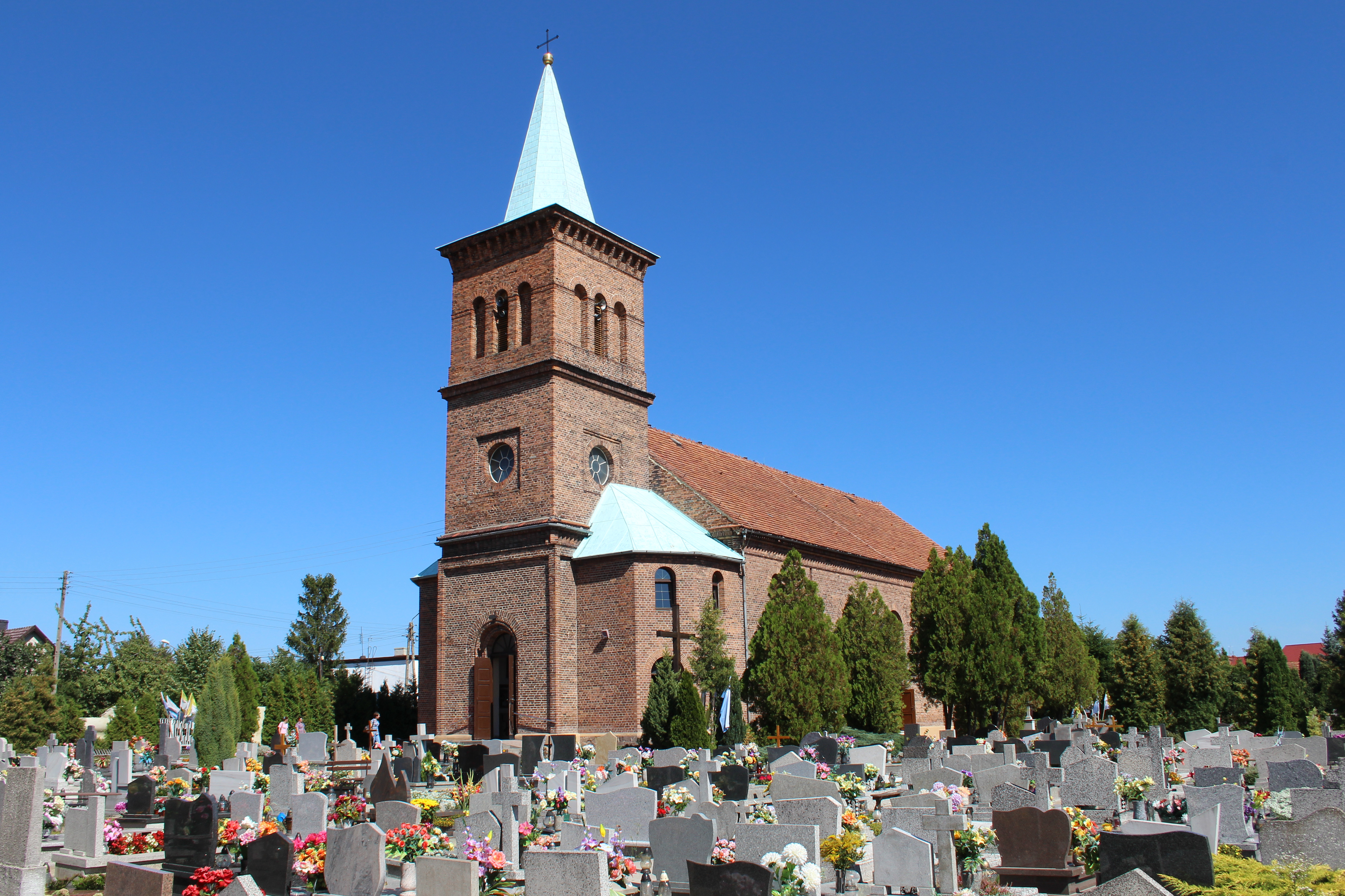 Tułowice - rzymskokatolicki kościół parafialny pw. św. Rocha, cmentarz